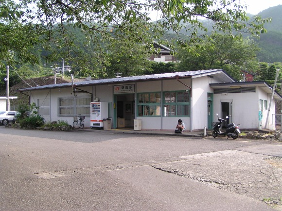 Atashika Station, Kumano, Mie, Japan